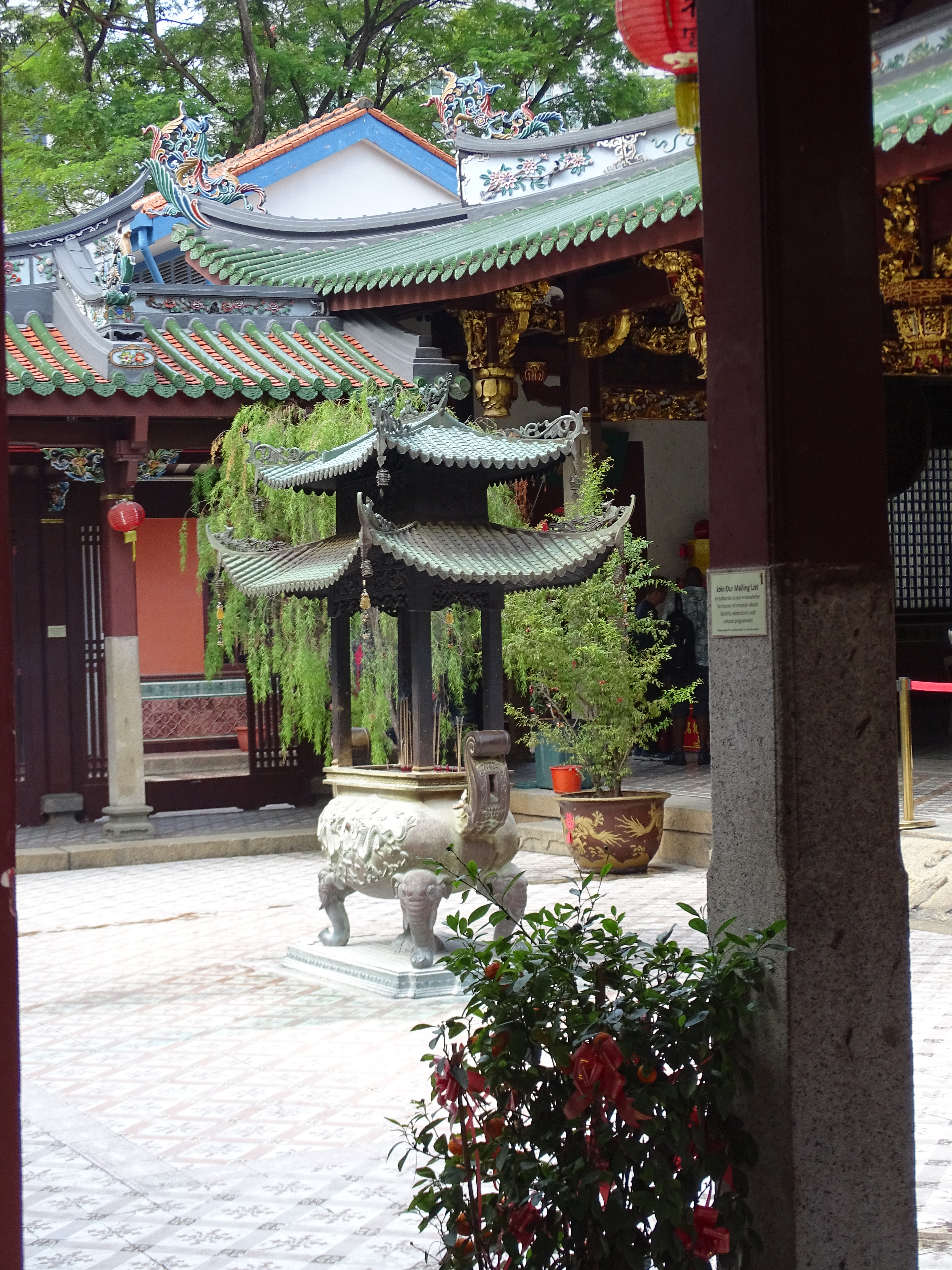 Tempelanlage Thian Hock Keng, Innenhof, Chinatown Singapur